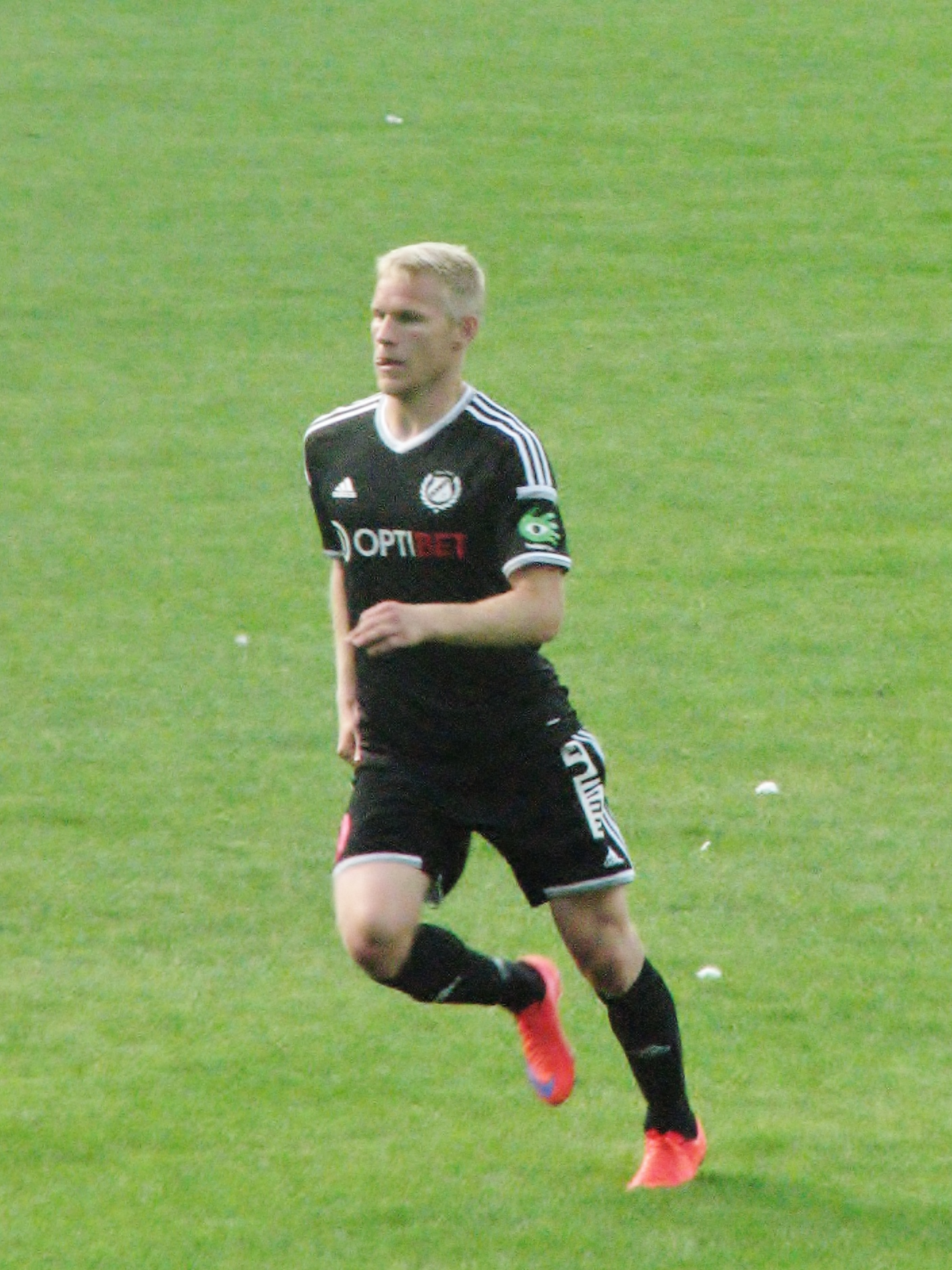 Ats Purje mängimas FC Flora vastu